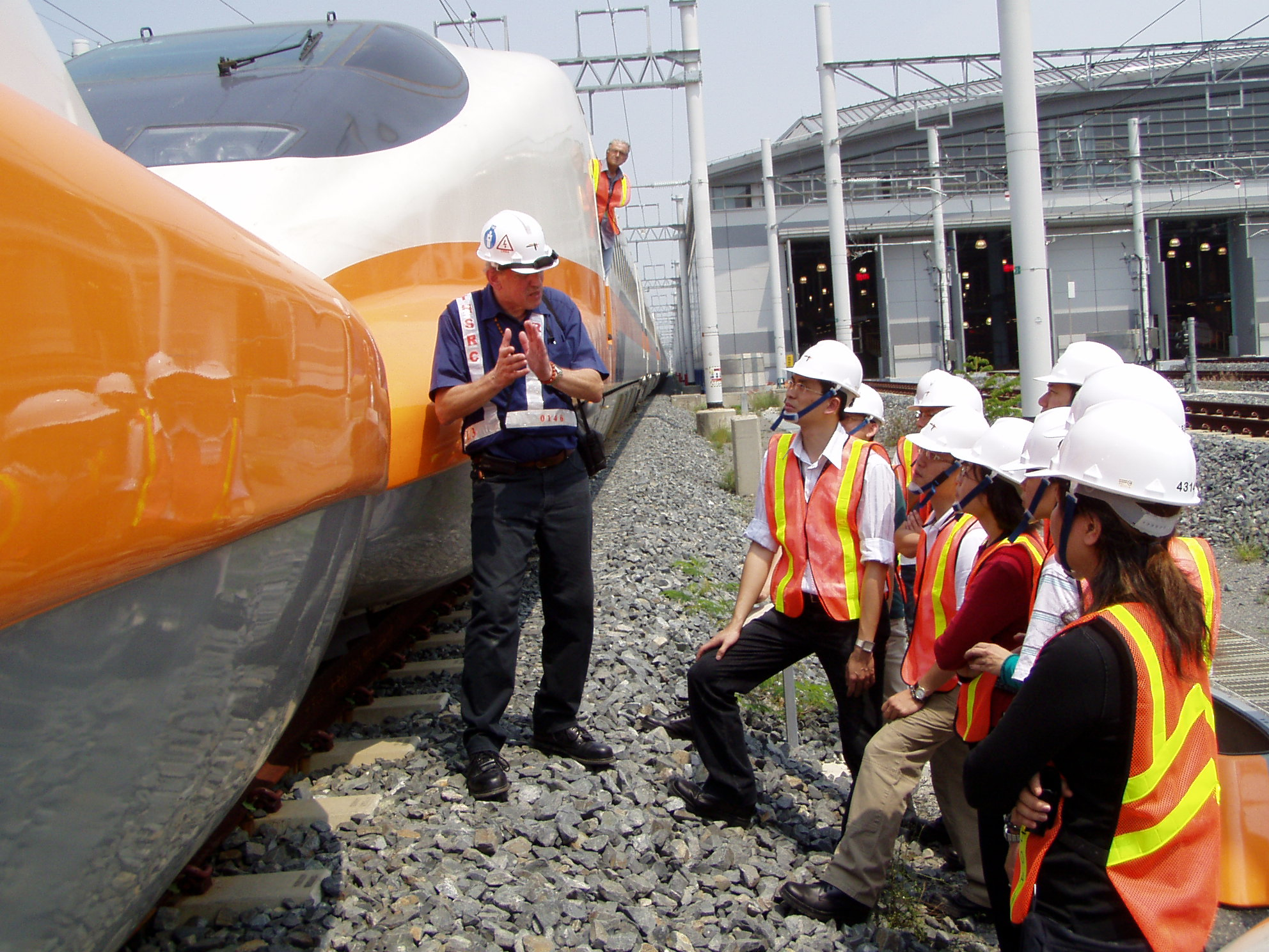 台灣高鐵行車人員訓練：法國駕駛講師正在對本國籍列車長講解列車聯結與解聯的實作課程。